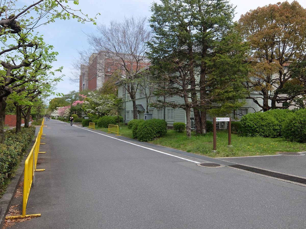 京都大学医学部構内。中央に見える木造建築物は「基礎医学記念講堂・医学部資料館」（旧解剖学教室講堂）。